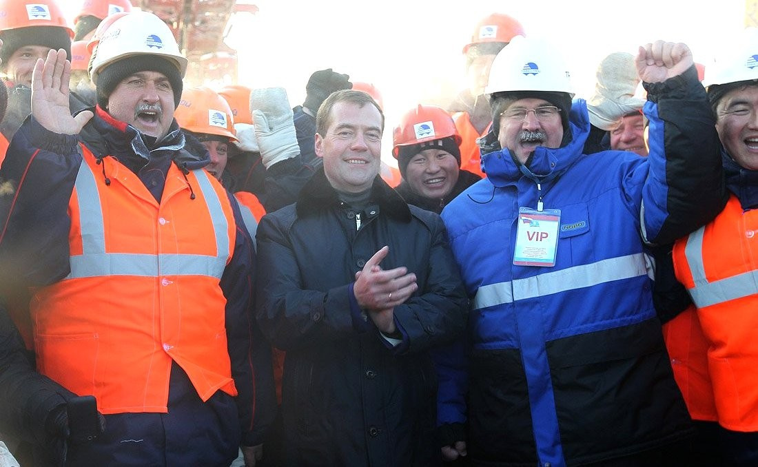 На церемонии открытия участка железной дороги Беркакит – Томмот – Нижний Бестях.